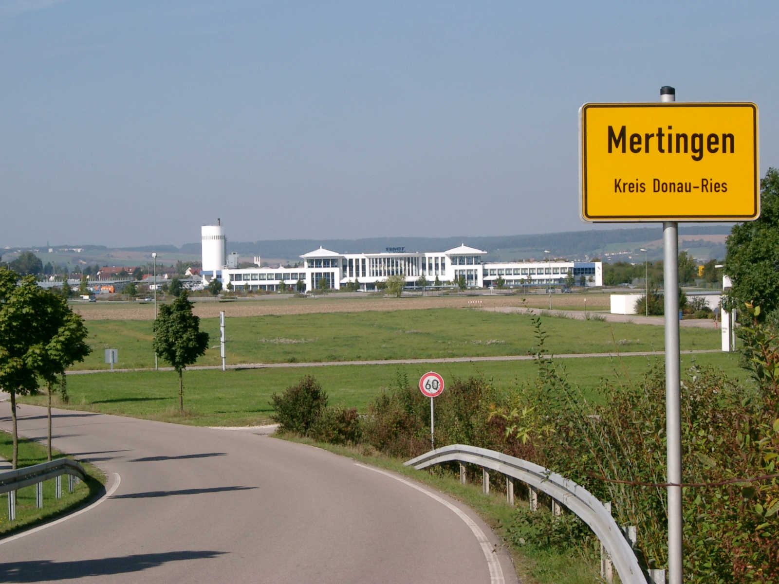 Gewerbepark Mertingen-Ost, Kreis Donau-Ries, Bayern